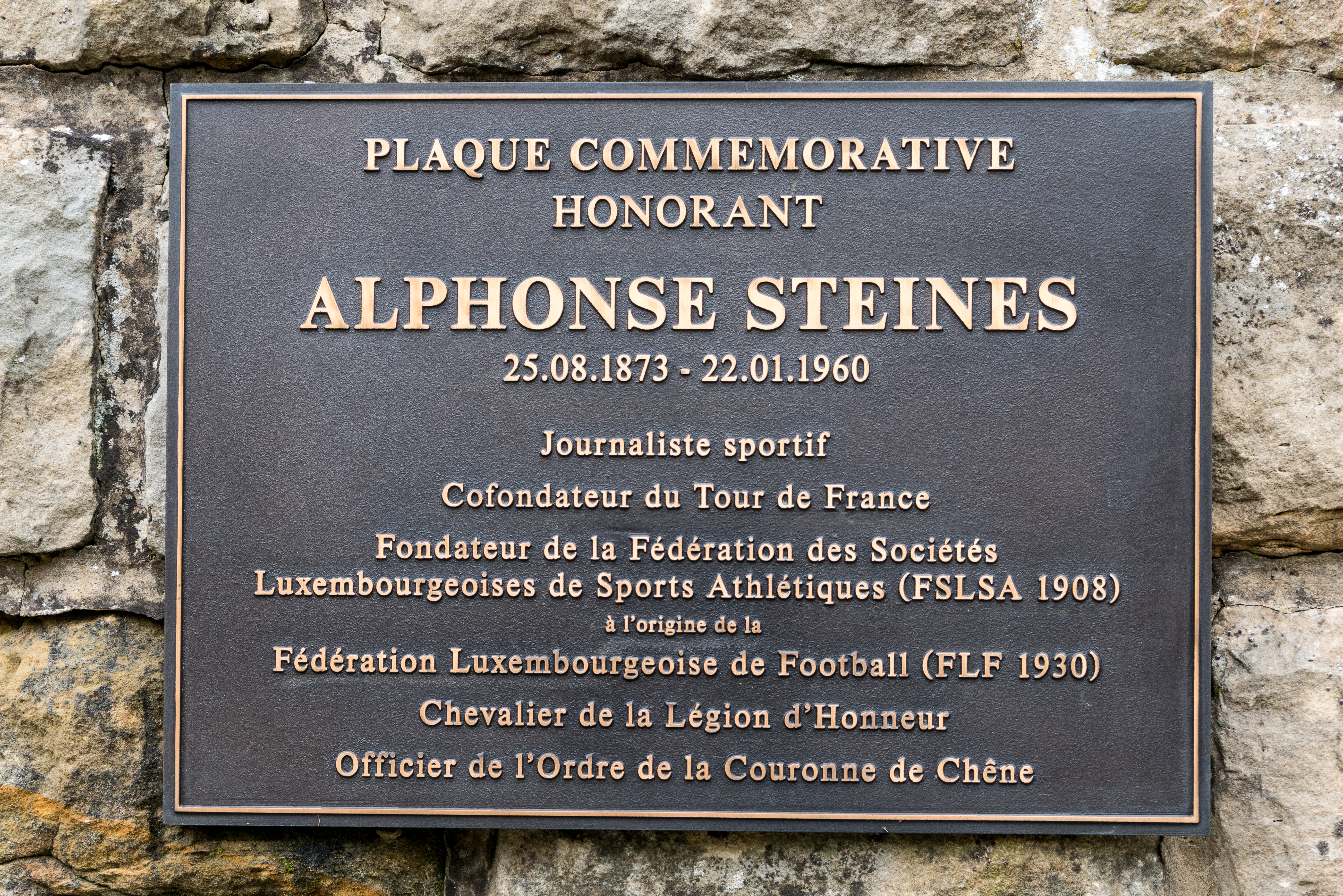 Erënnerungsplack Alphonse Steinès um Kierfecht zu Weimeschkierch.